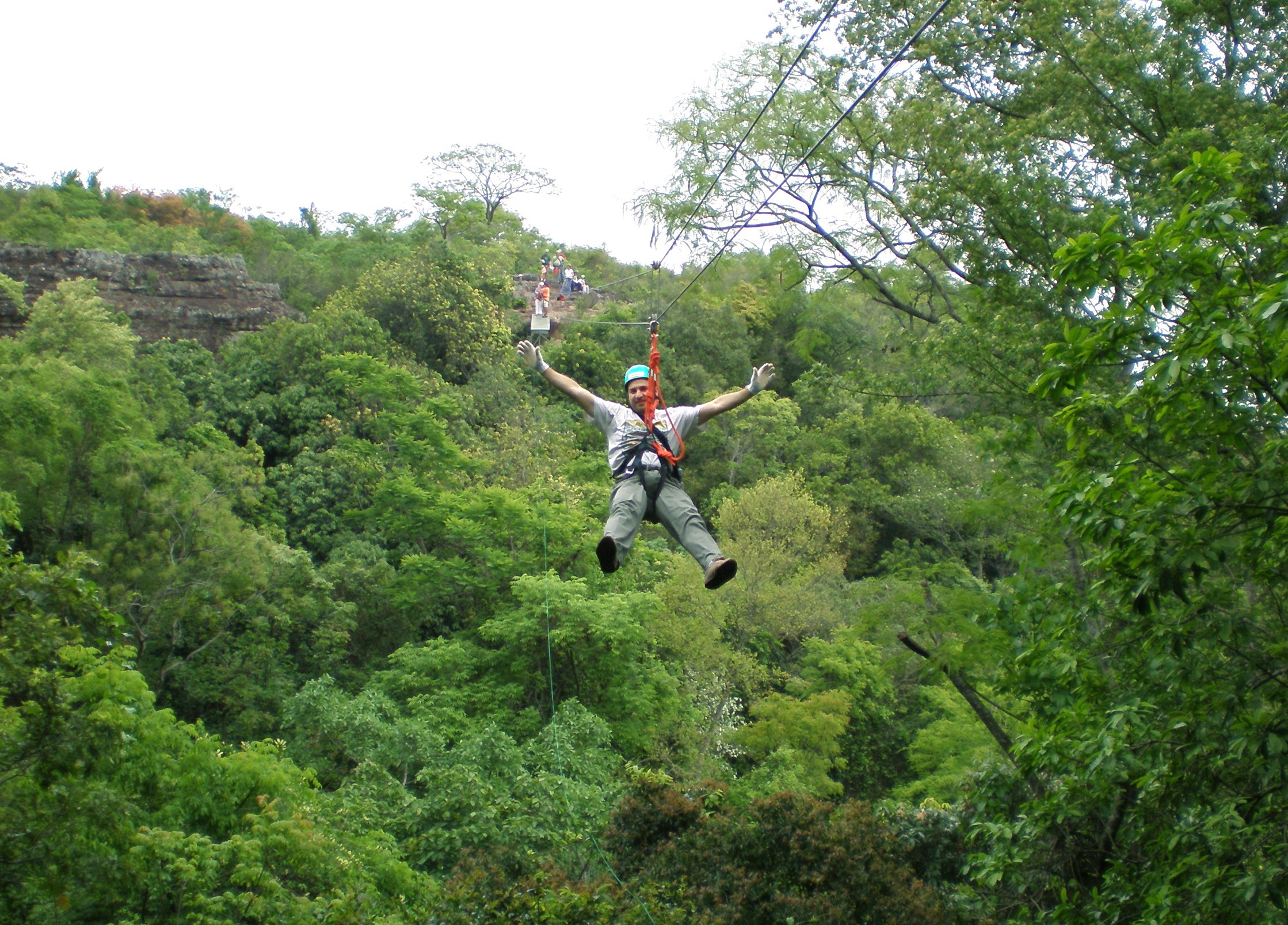 Mbatovi. Tirolesa en la Eco Reserva Mbatovi.